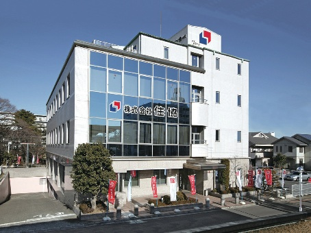 株式会社住協の本社外観写真